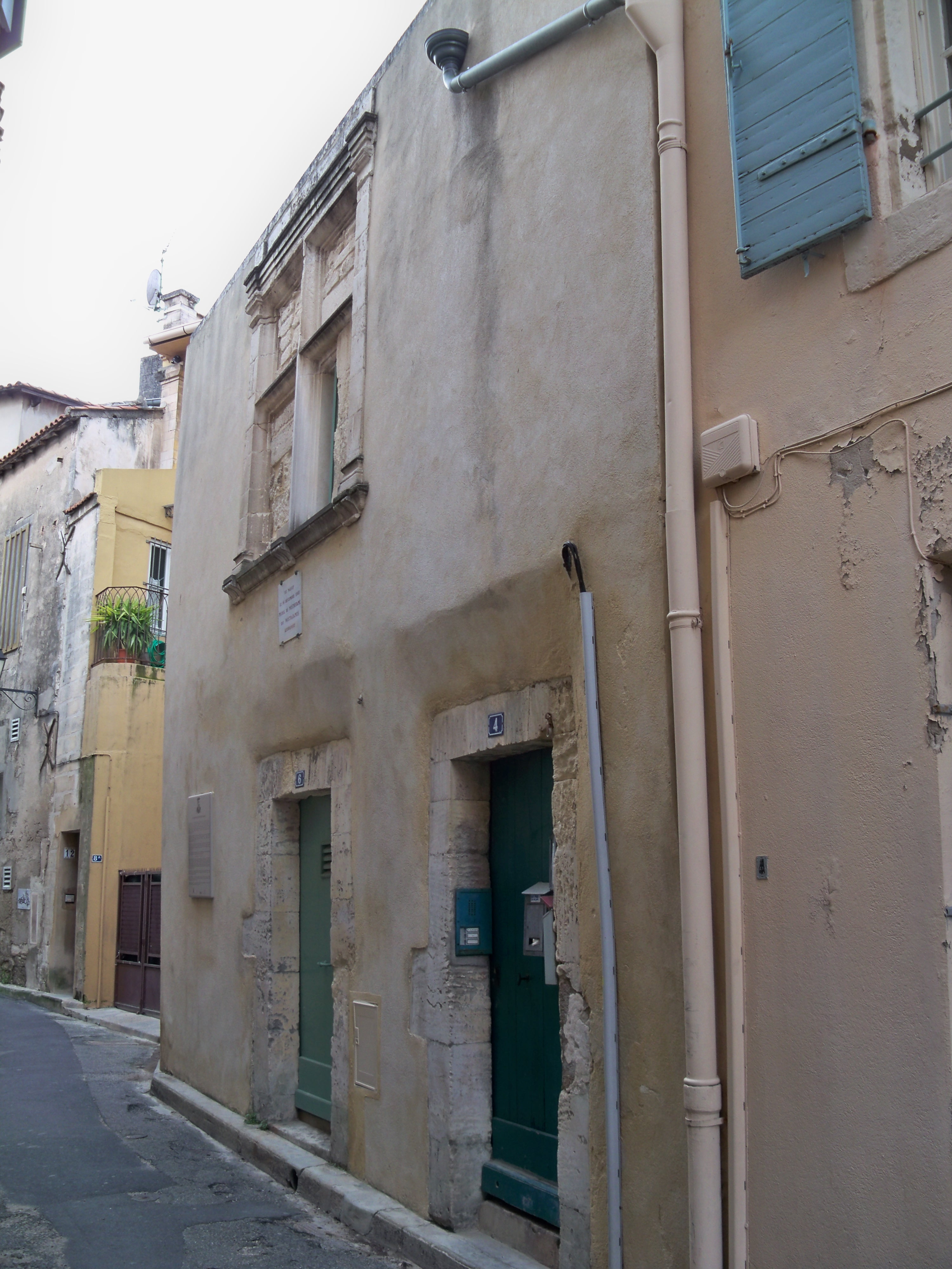 Maison natale de Michel de Notredame, dit Nostradamus, à Saint Rémy de Provence (13), France